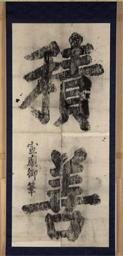 조선 선조의 필적